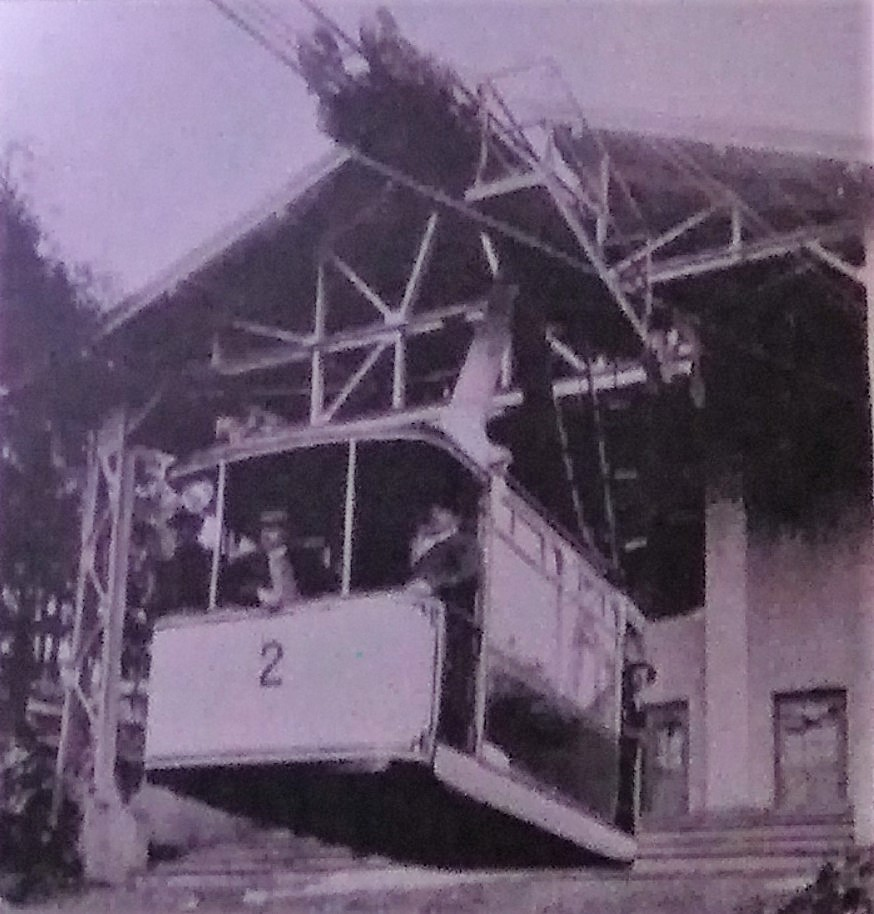 Funivia del Colle - Seconda cabina presso la stazione a monte